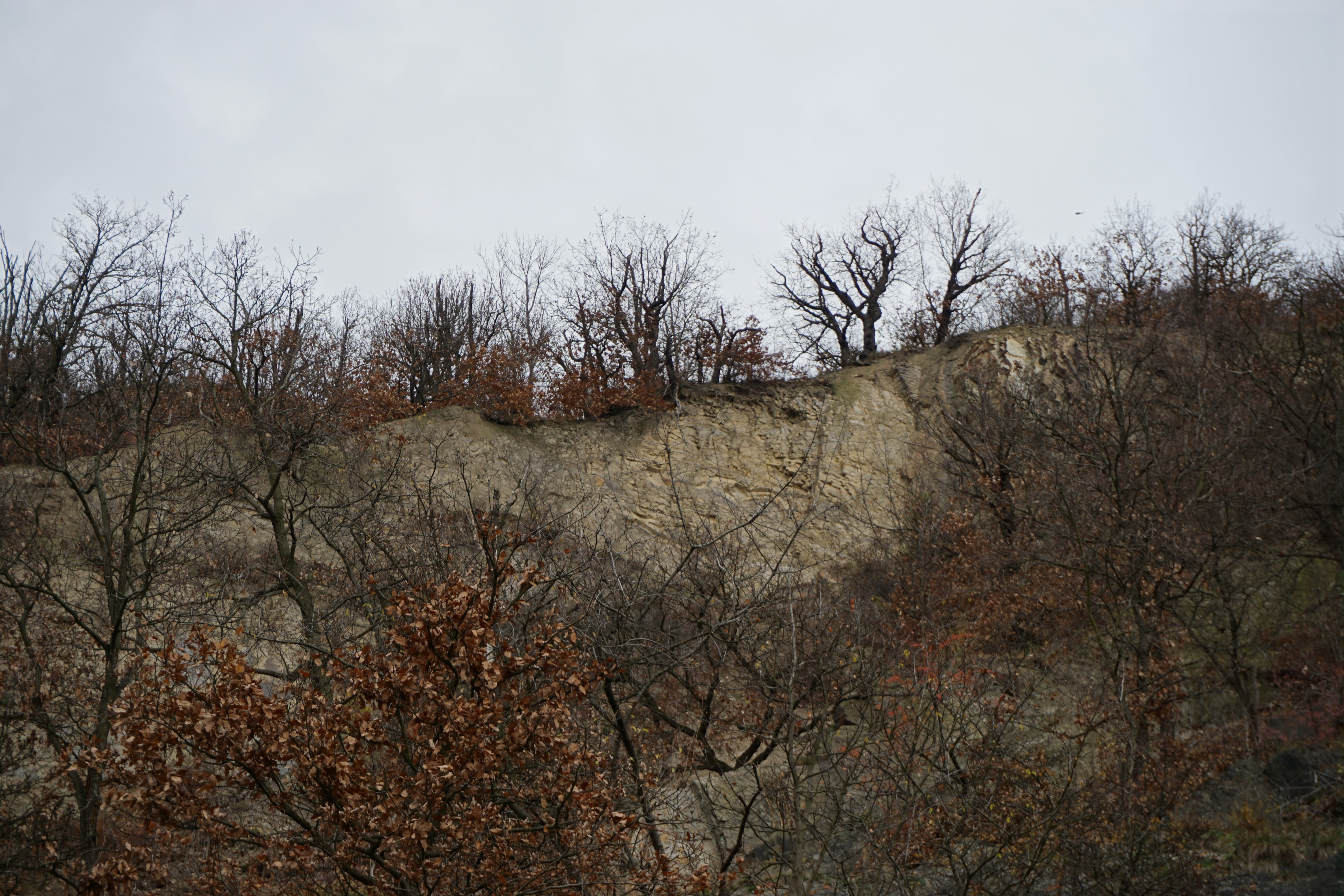 Výhled z Povltavské ulice